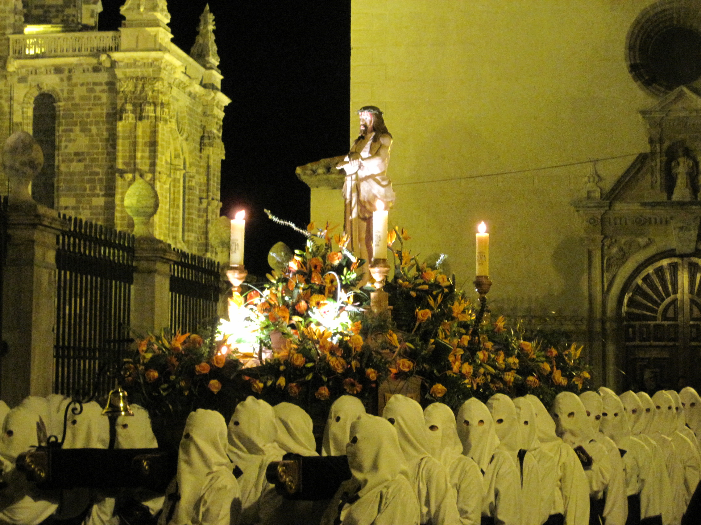 Ecce Homo, propiedad de la localidad de Valdeviejas. Hermandad de Caballeros del Silencio de Nuestro Padre Jesús Nazareno, Astorga (León, España).